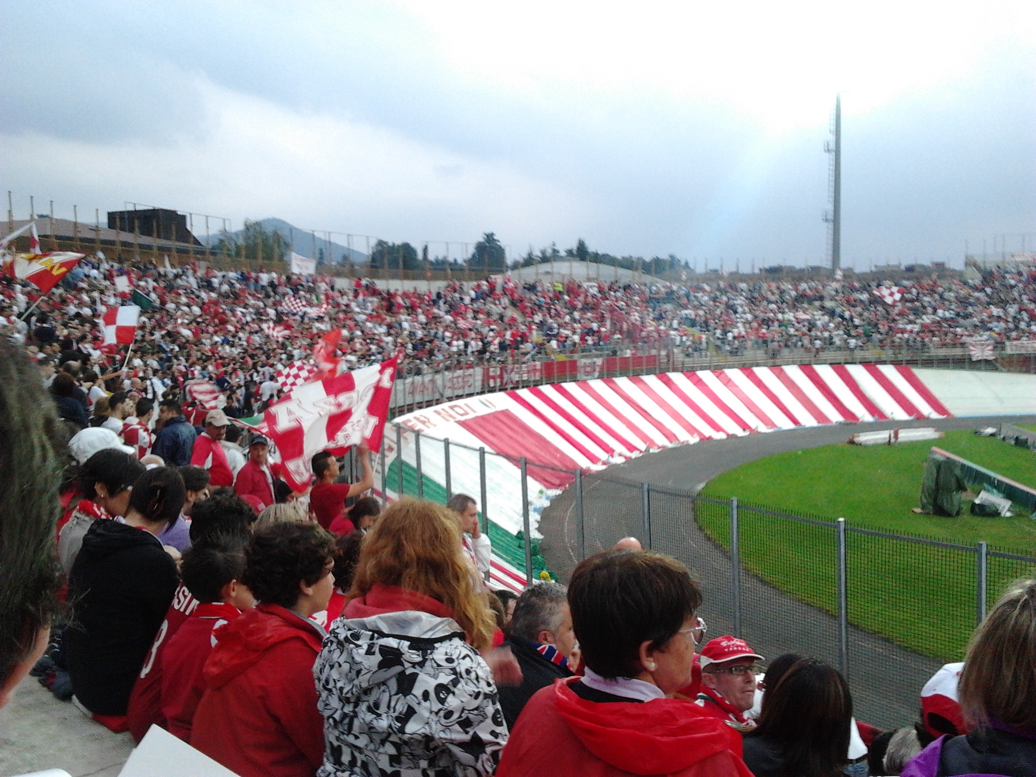 La curva nord dello Stadio Franco Ossola di Varese in occasione della partita dell'A.S. Varese 1910 contro la Sampdoria, valida come spareggio per la promozione in Serie A, disputata il 9 giugno 2012